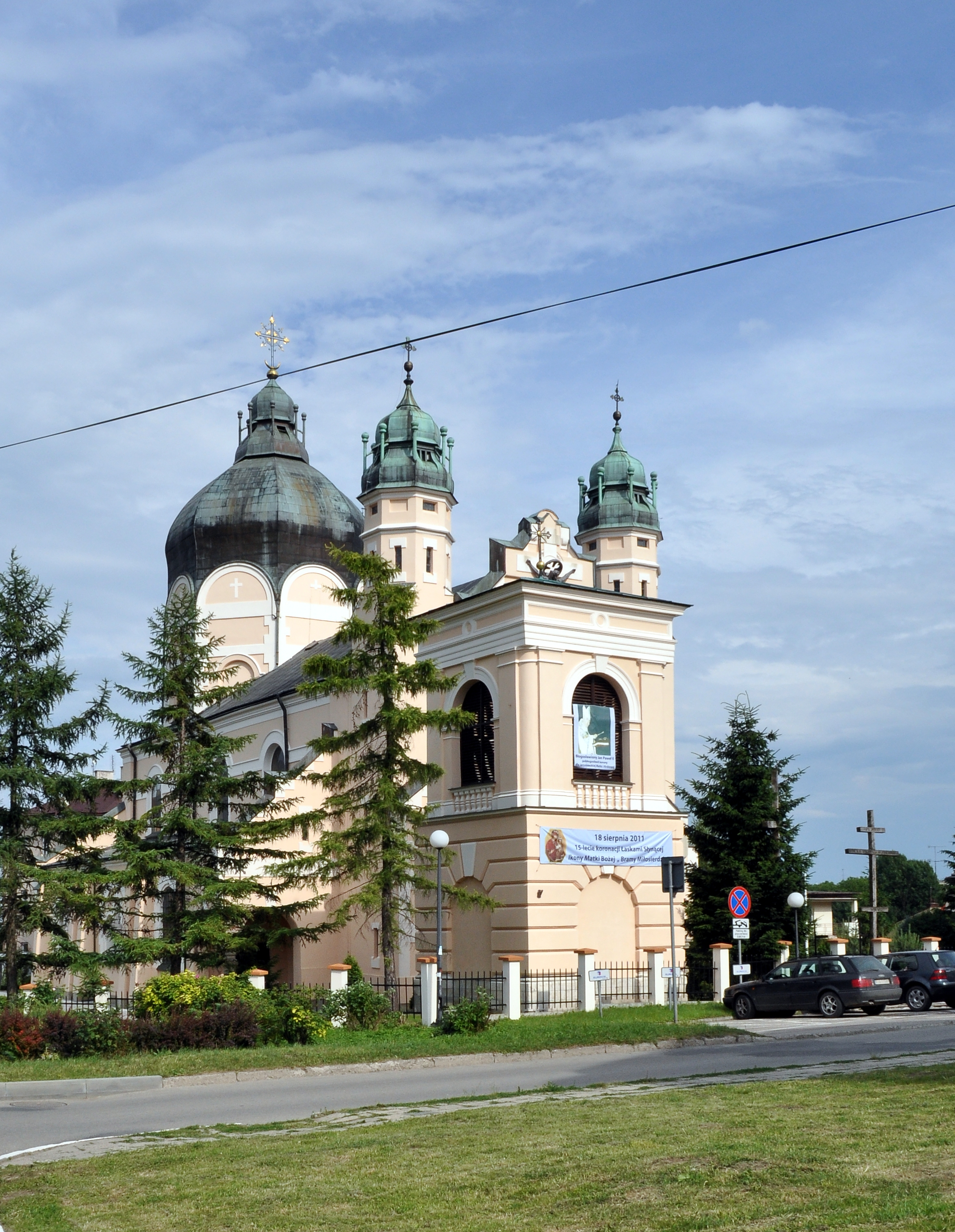 Jarosław, ul. Sobieskiego - dawna cerkiew greckokatolicka p.w. Przemienienia Pańskiego, obecnie kościół rzymskokatolicki (zabytek nr A/297 z 22.02.1951).